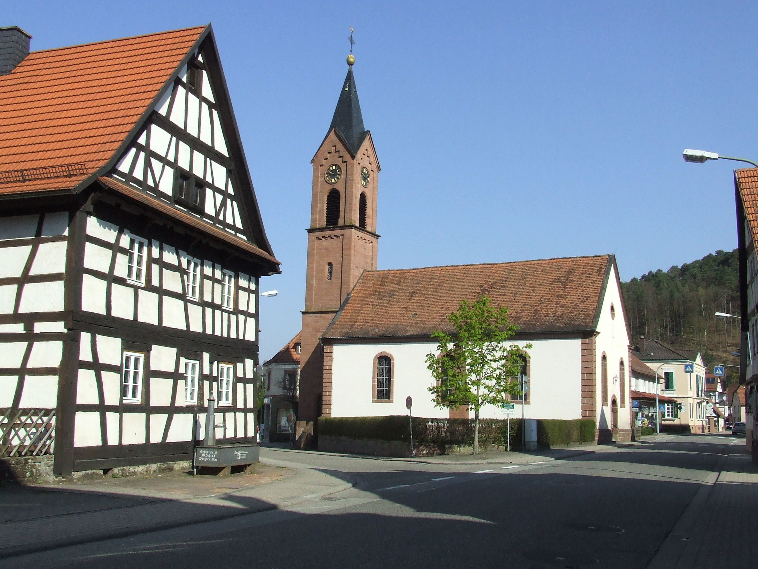 Hinterweidenthal Ortsmitte